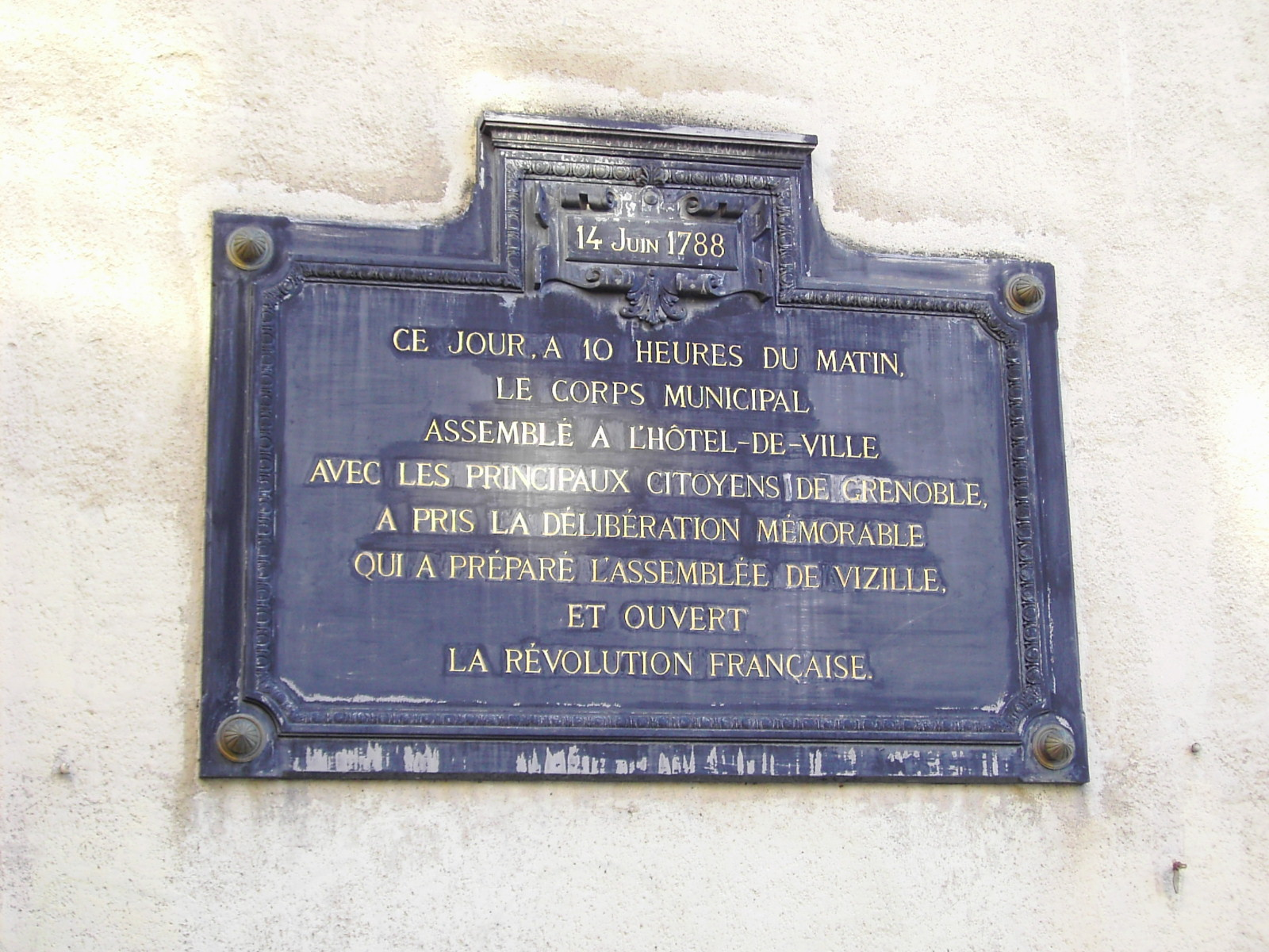 plaque révolution française posée sur l'ancien Hôtel de Lesdiguières, devenu Maison de l'international en 2006 - 1 rue Hector Berlioz à Grenoble